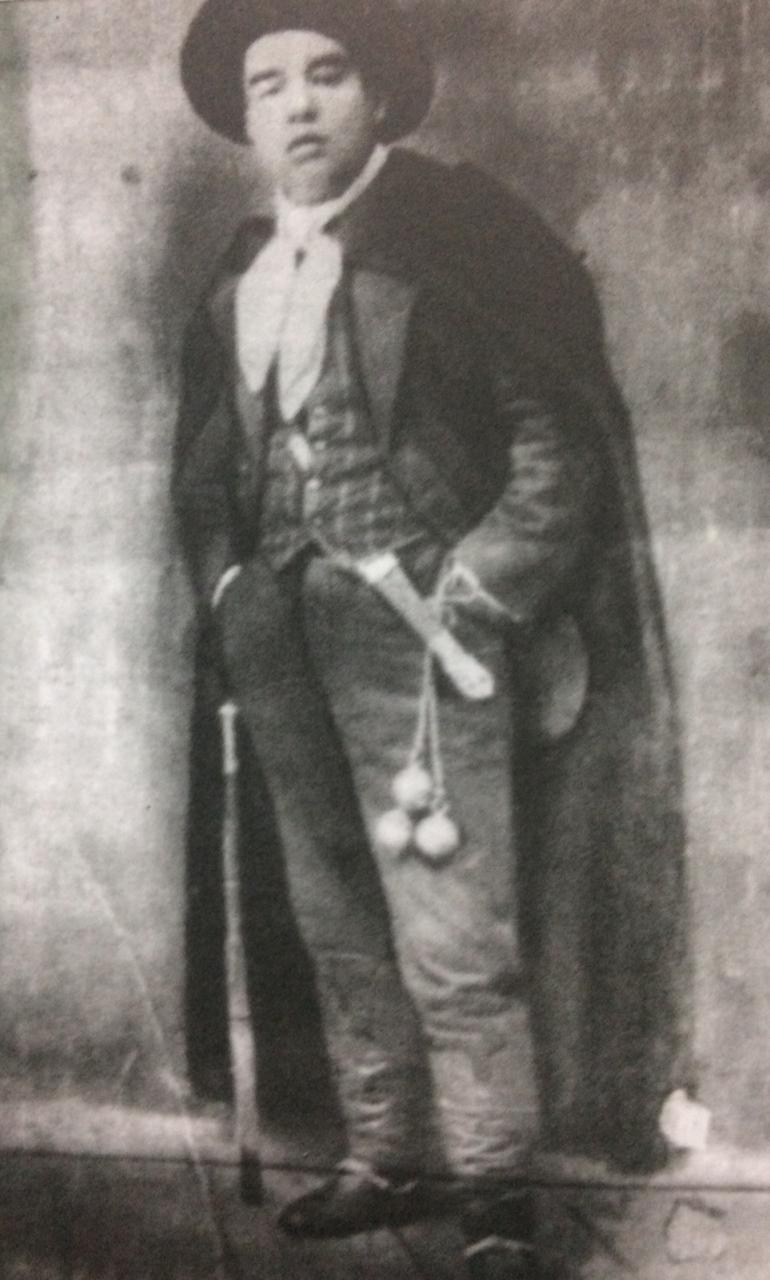 Carlos Cavaco, líder socialista de Porto Alegre.